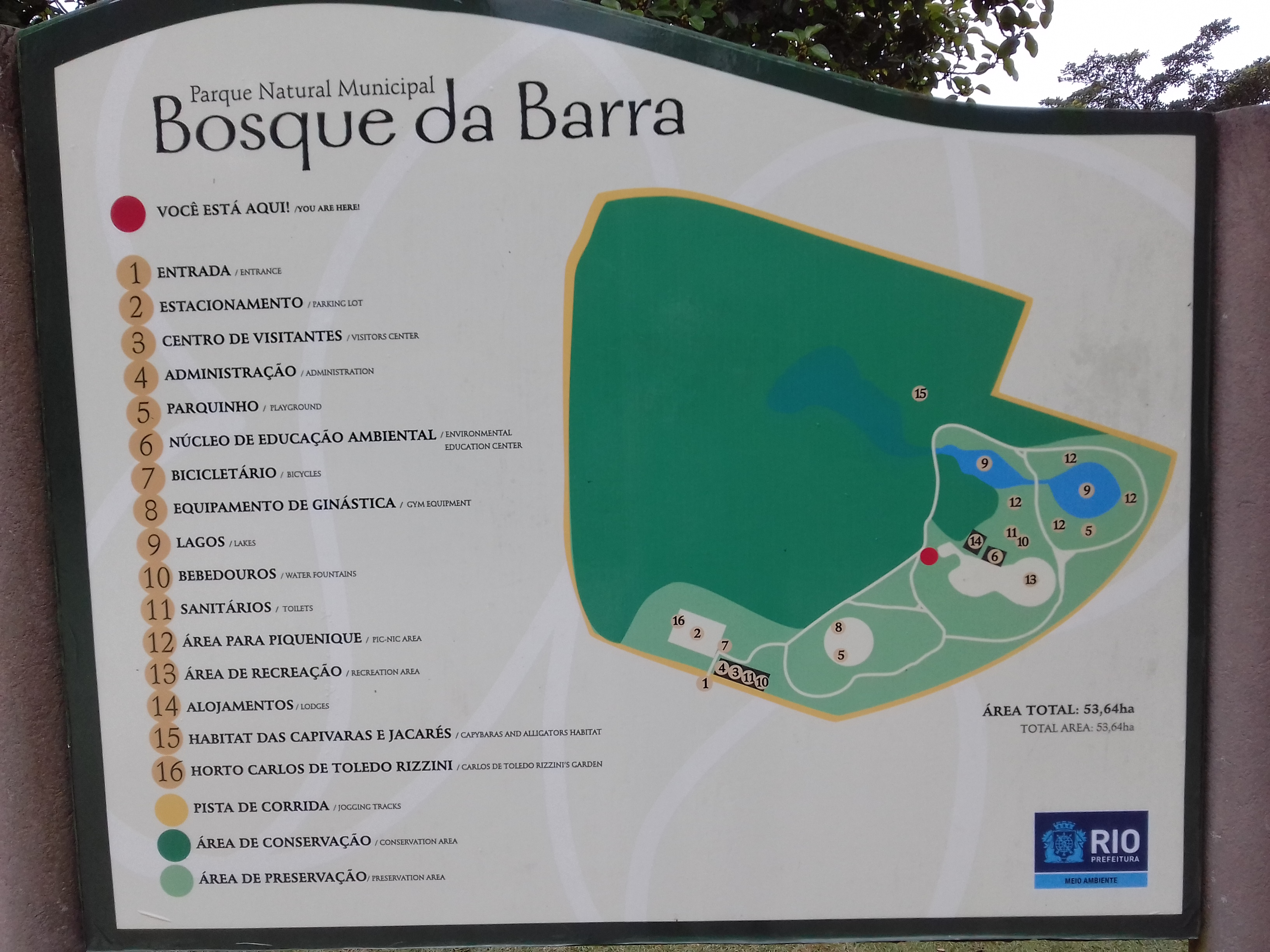 Bosque da Barra Karte des Parks, Rio de Janeiro, RJ, Brasil